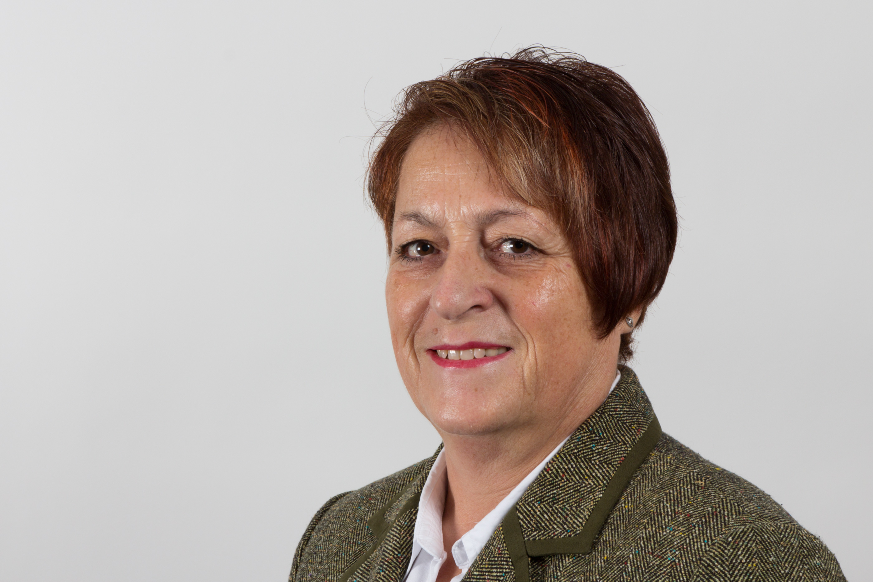 Edeltraud Rogée (* 7. April 1954 in Wanzleben) ist eine deutsche Politikerin (Die Linke) und Mitglied im Landtag Sachsen-Anhalts. Wikipedia im Landtag – Sachsen-Anhalt 13./14. Dezember 2012 in MagdeburgDieses Foto wurde im Rahmen des Projektes „Wikipedia im Landtag“ erstellt. The making of this document was supported by the Community-Budget of Wikimedia Germany. The making of this work was supported by Wikimedia Austria. For other files made with the support of Wikimedia Austria, please see the category Supported by Wikimedia Österreich. Personality rights warningAlthough this work is freely licensed or in the public domain, the person(s) shown may have rights that legally restrict certain re-uses unless those depicted consent to such uses. In these cases, a model release or other evidence of consent could protect you from infringement claims.